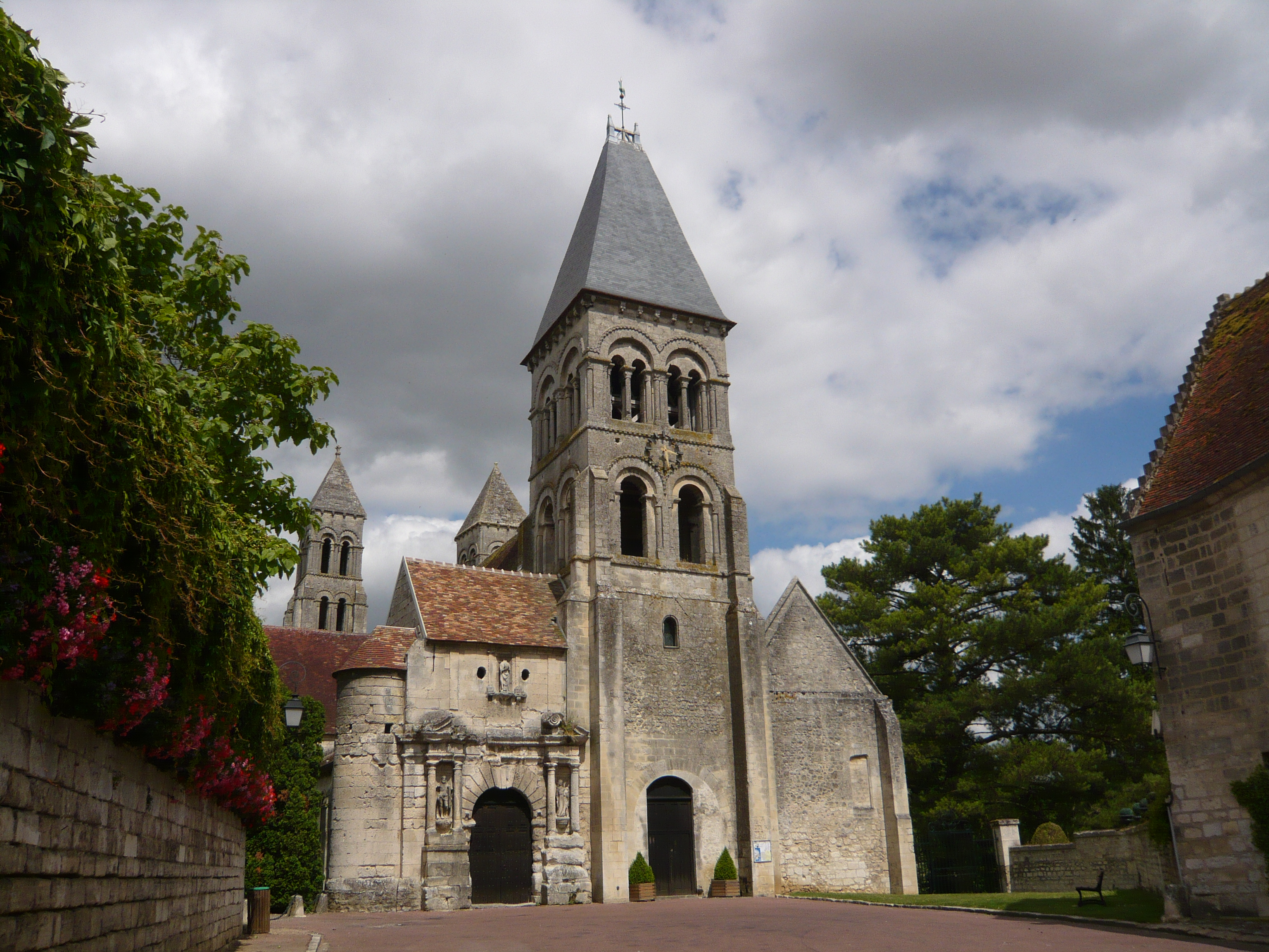 Façade de l'abbaye de Morienval (Oise)